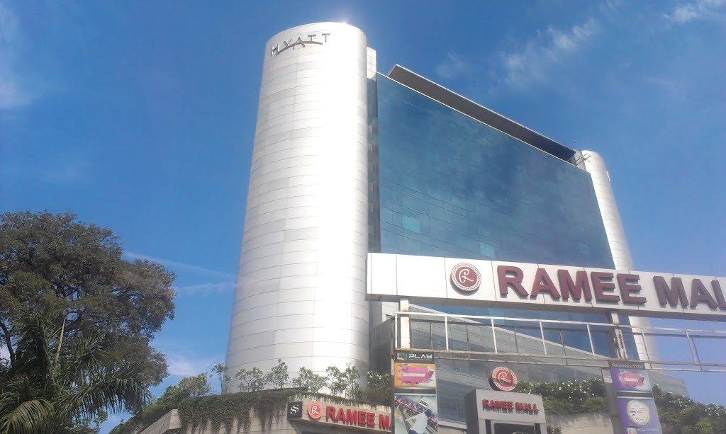 Teynampet Hyatt Chennaj